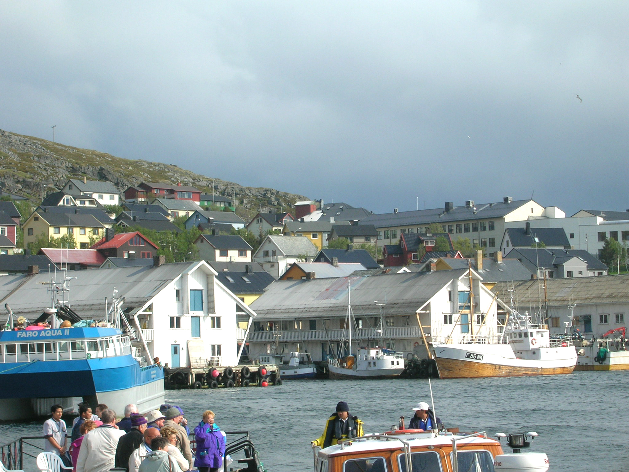 Den Hafen vun Honningsvag